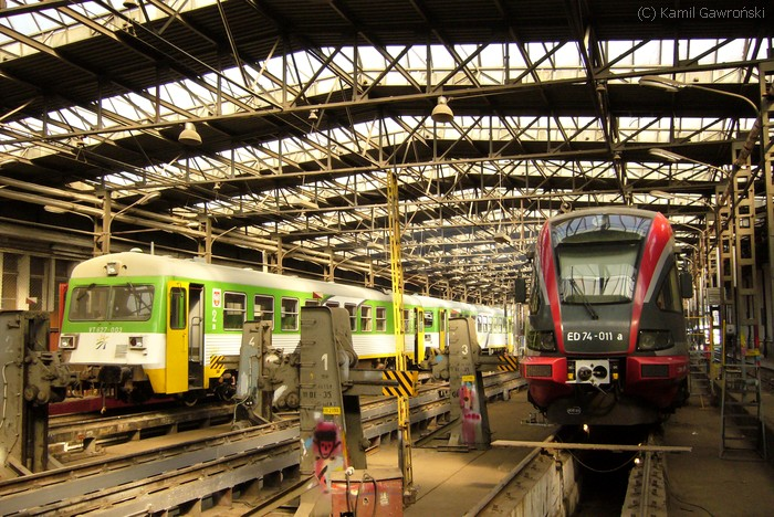 Spalinowy wagon silnikowy VT627-003 i elektryczny zespół trakcyjny Pesa Bydgostia ED74-001 w hali ZNTK Mińsk Mazowiecki.